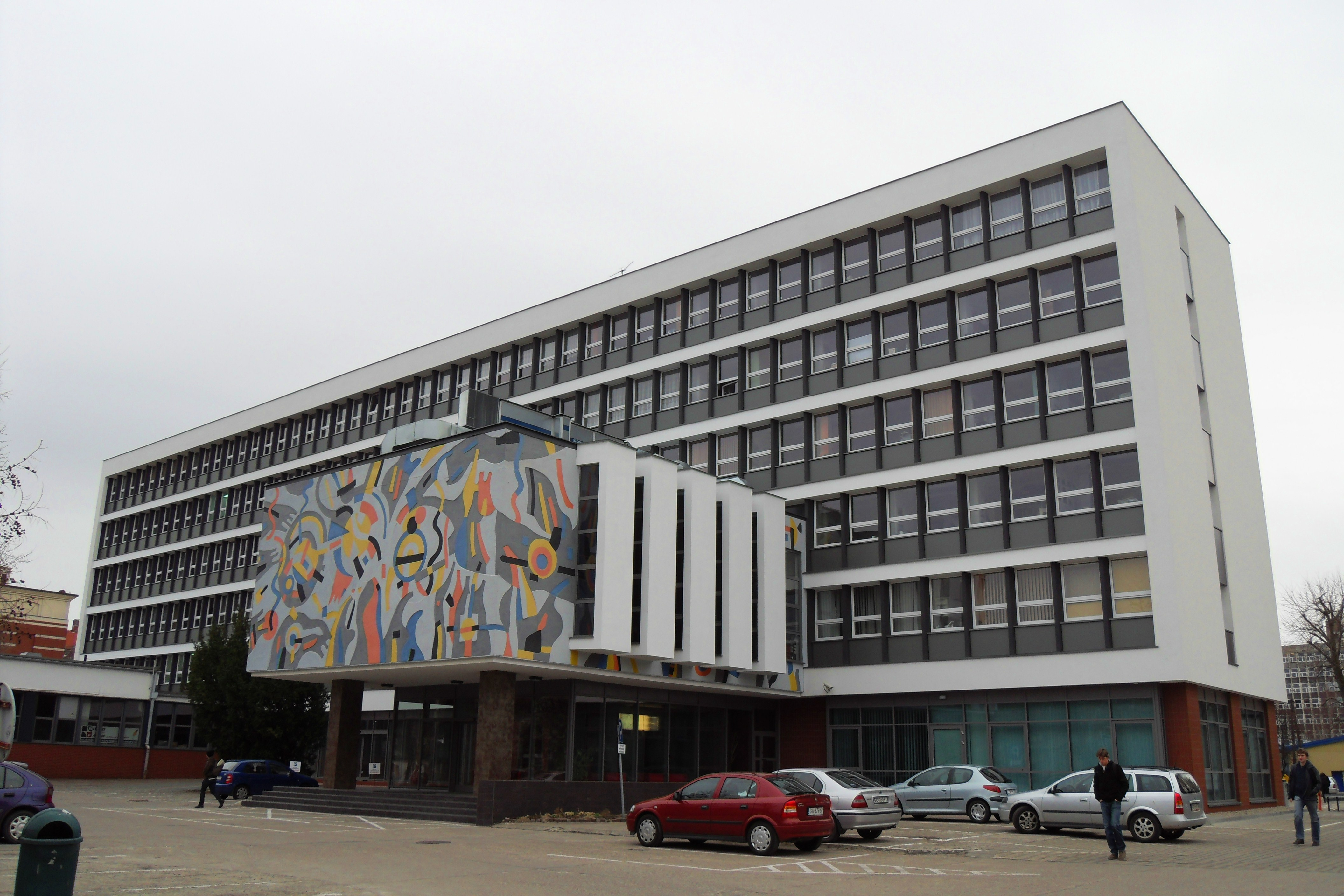 Gdańsk Wrzeszcz, ul. Fiszera 14. Instytut Maszyn Przepływowych.